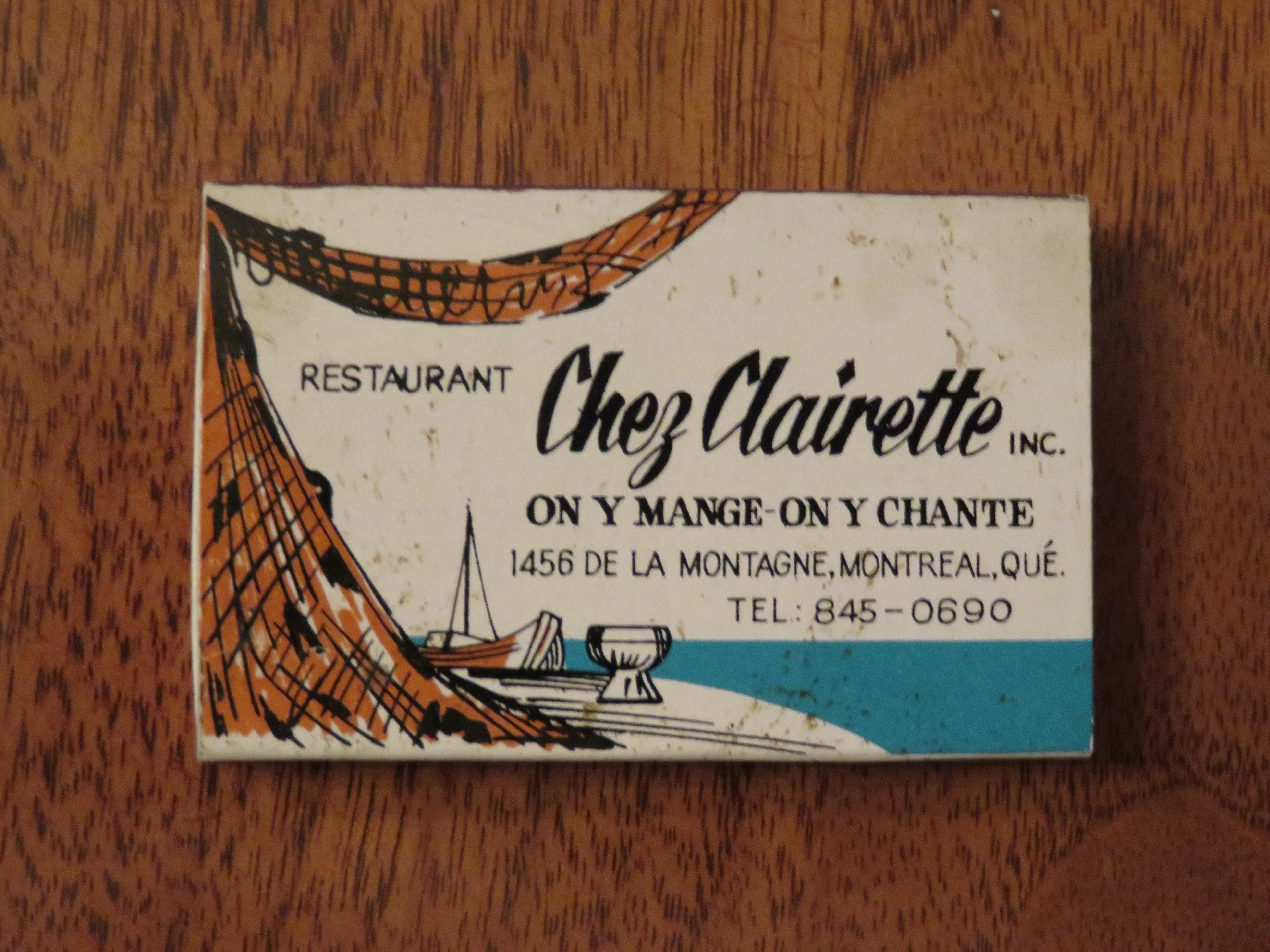 Boîte d'allumettes du restaurant Chez Clairette, années 1960, restaurant tenu par la chanteuse et comédienne Clairette Oddera à Montréal, Québec.